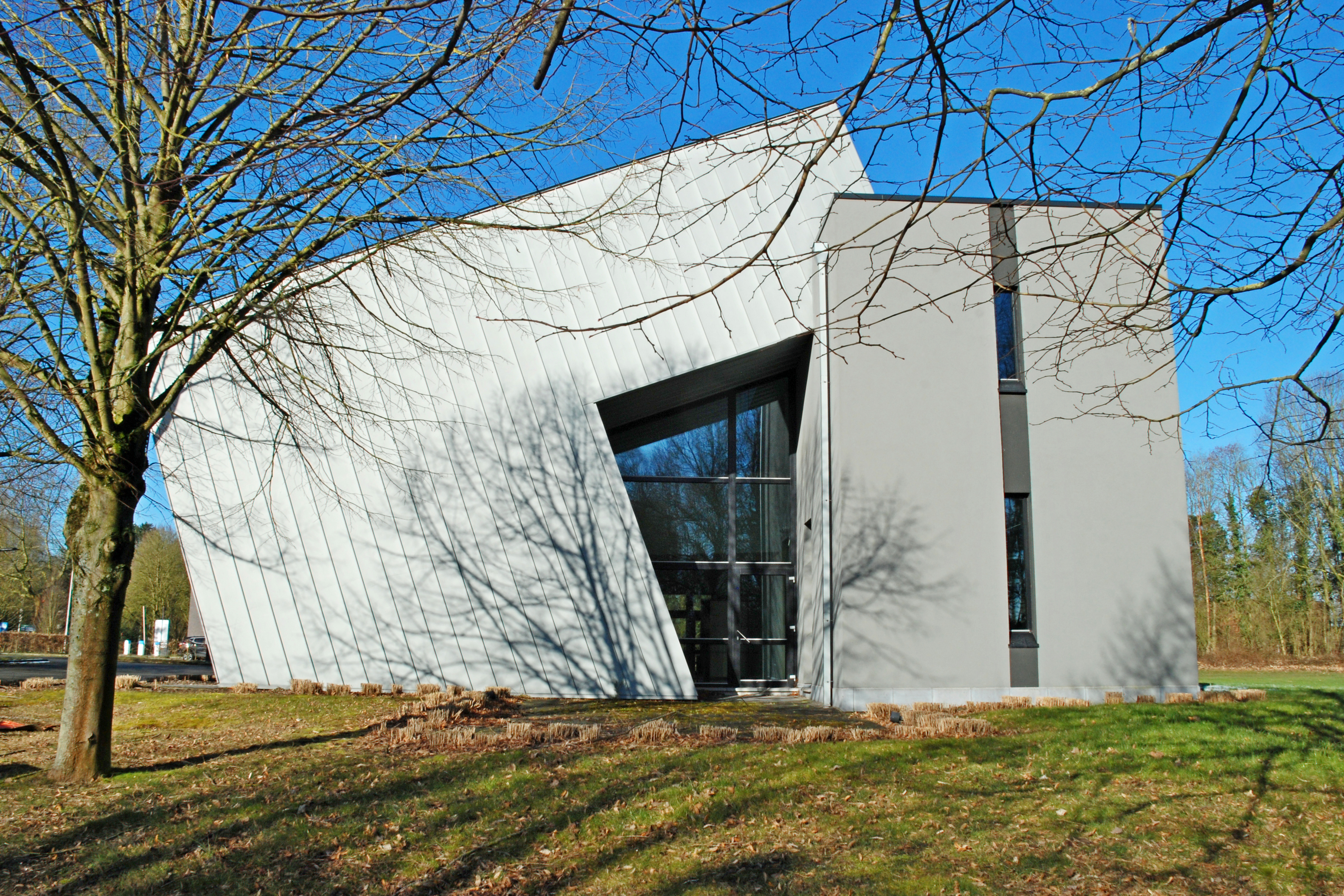 Belgique - Louvain-la-Neuve - rue Louis de Geer - Siège de Nivelinvest (architecture postmoderne, Atelier d'architecture DDV, 2011) This photo of immovable heritage has been taken in the Walloon Region